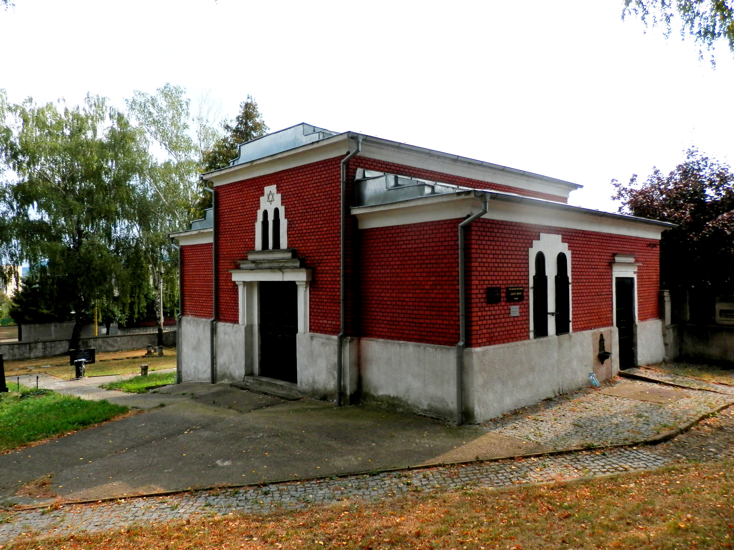 Márnica, cintorín židovský - neologický; Beth Olam . Ulica Krátka, mesto Prešov.